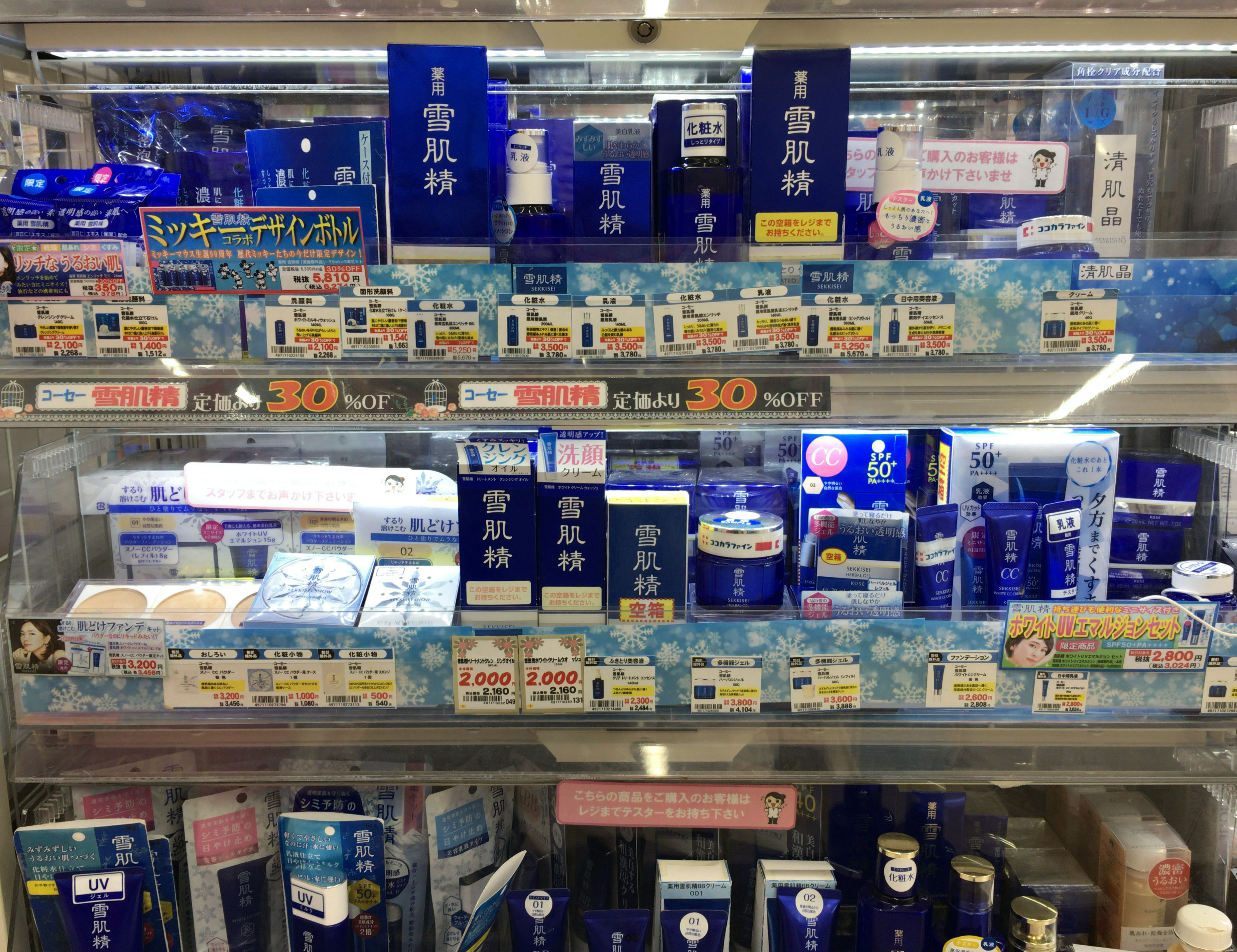 ドラッグストアでの雪肌精の陳列